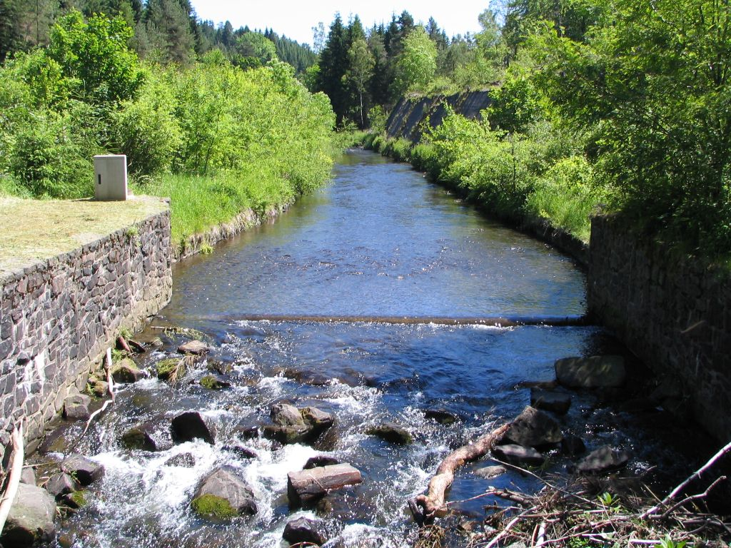 Die Innerste bei Clausthal-Zellerfeld, photographiert am